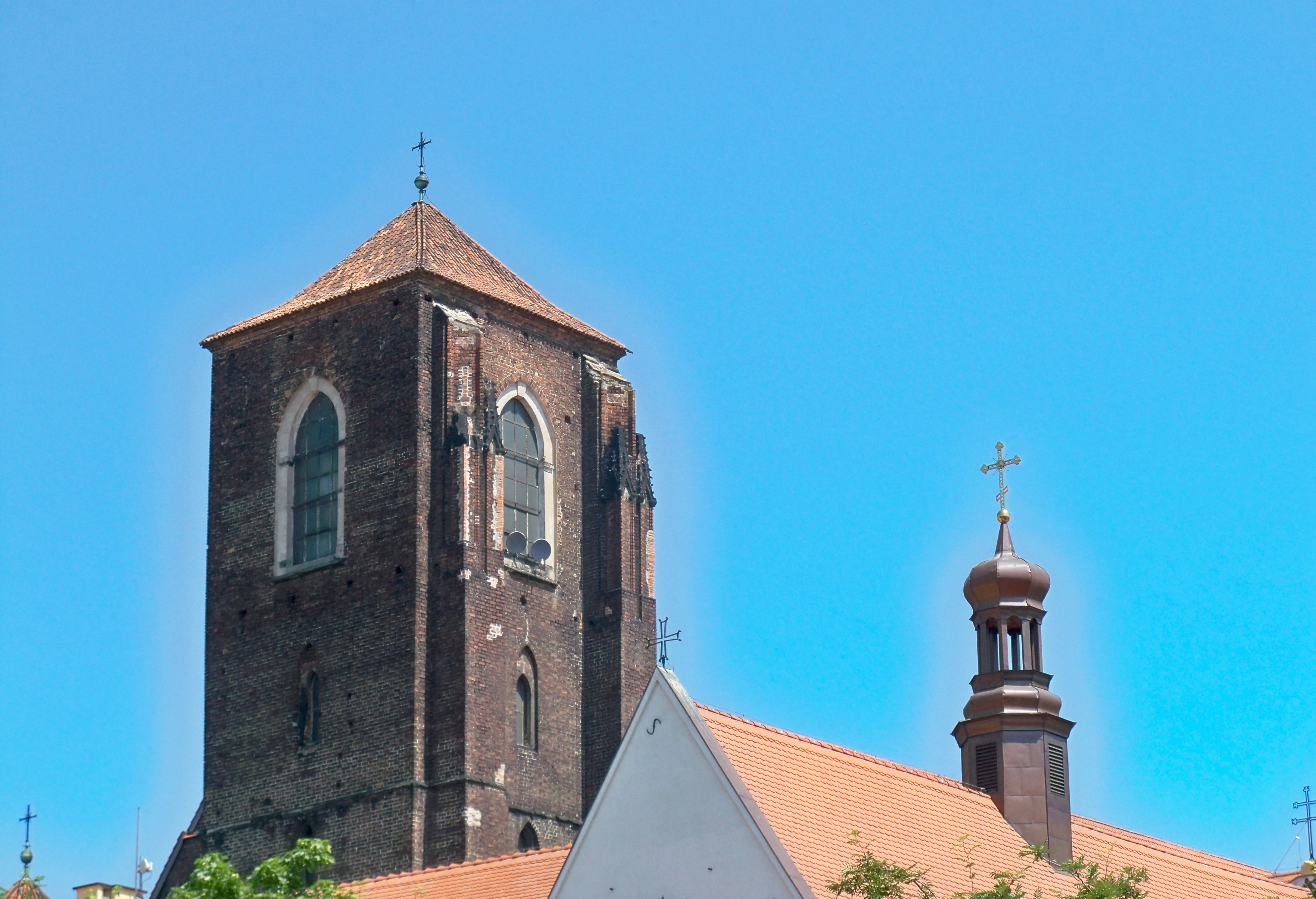 Wieże kościoła Najświętszej Marii Panny na Piasku i cerkwi św.św. Cyryla i Metodego, Wrocław